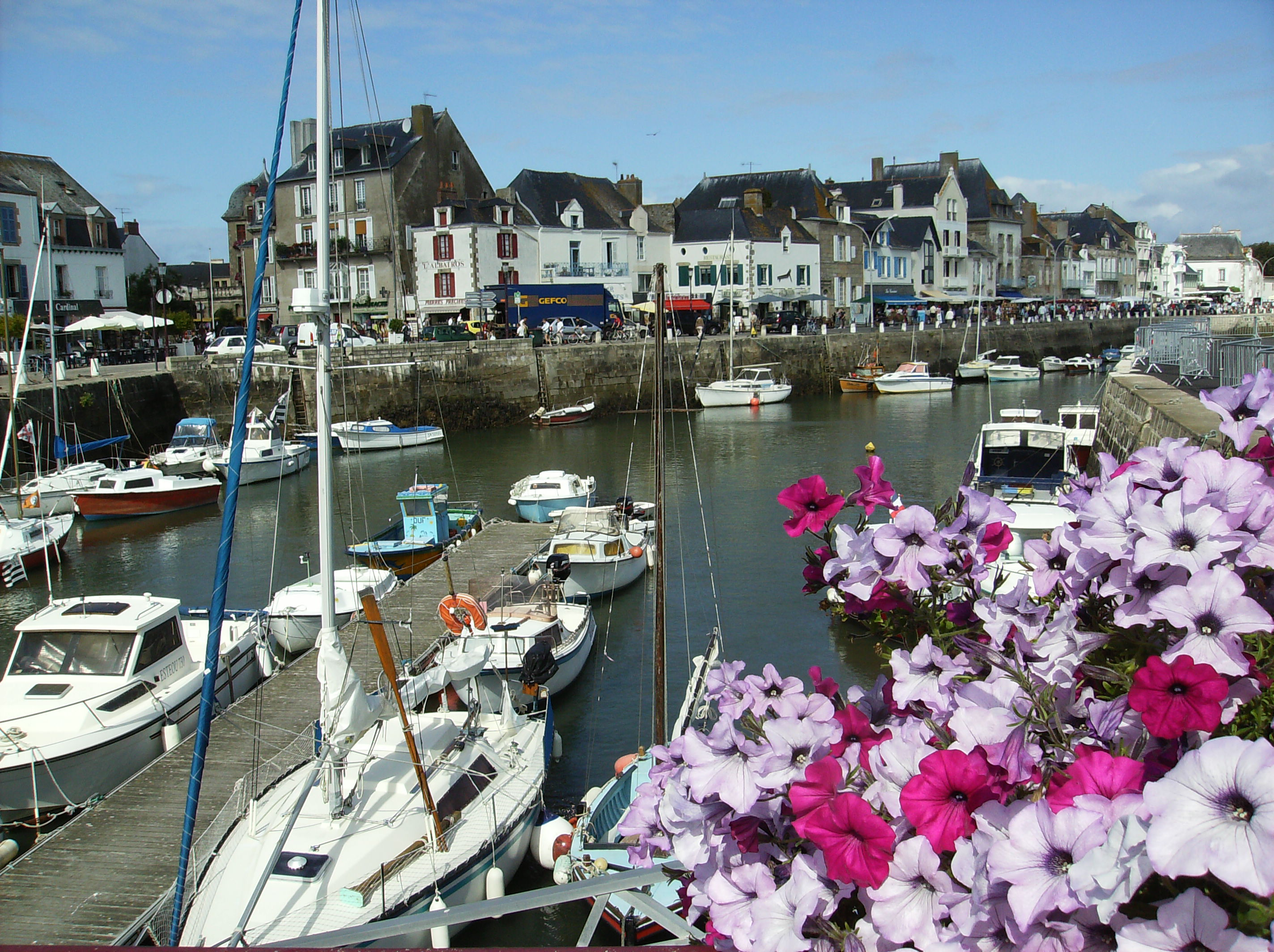 Le port de Le Croisic France